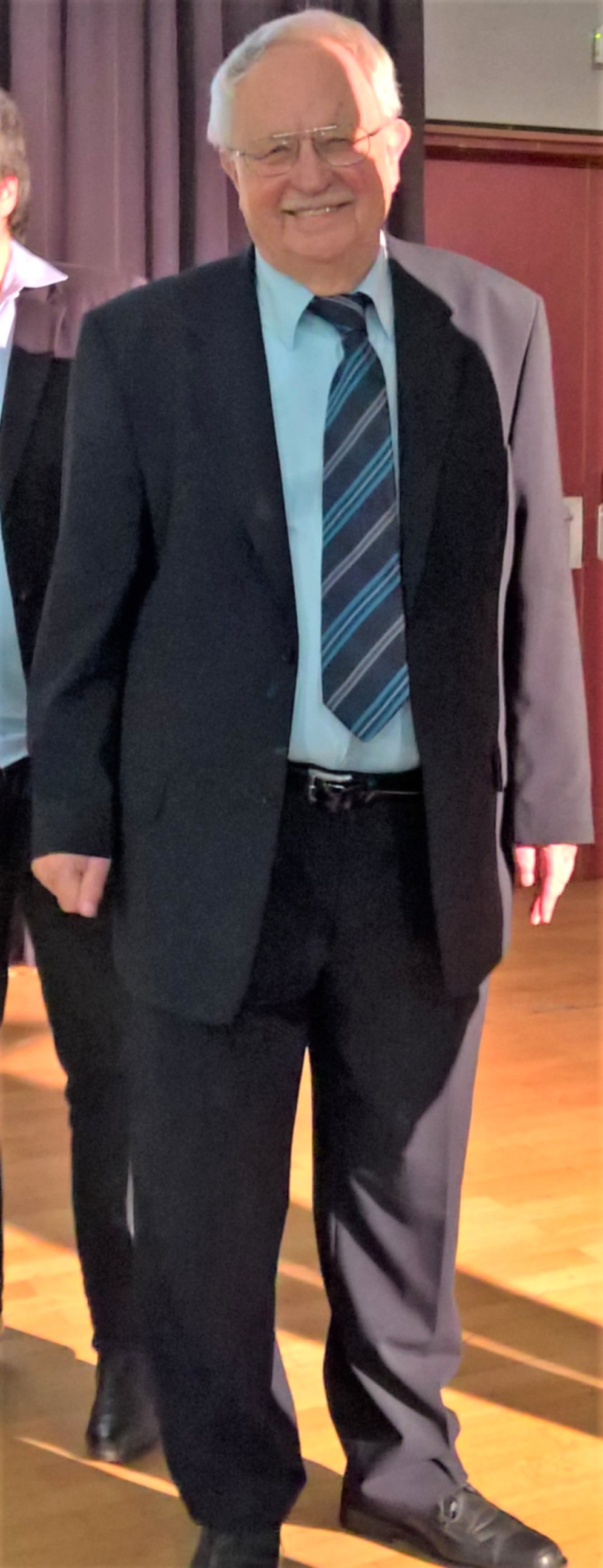 Der Physiker Sigurd Hofmann anlässlich seines Festvortrages am 21. März 2019 im Max-Planck-Gymnasium Groß-Umstadt zum 150. Jahrestag des Gymnasiums.